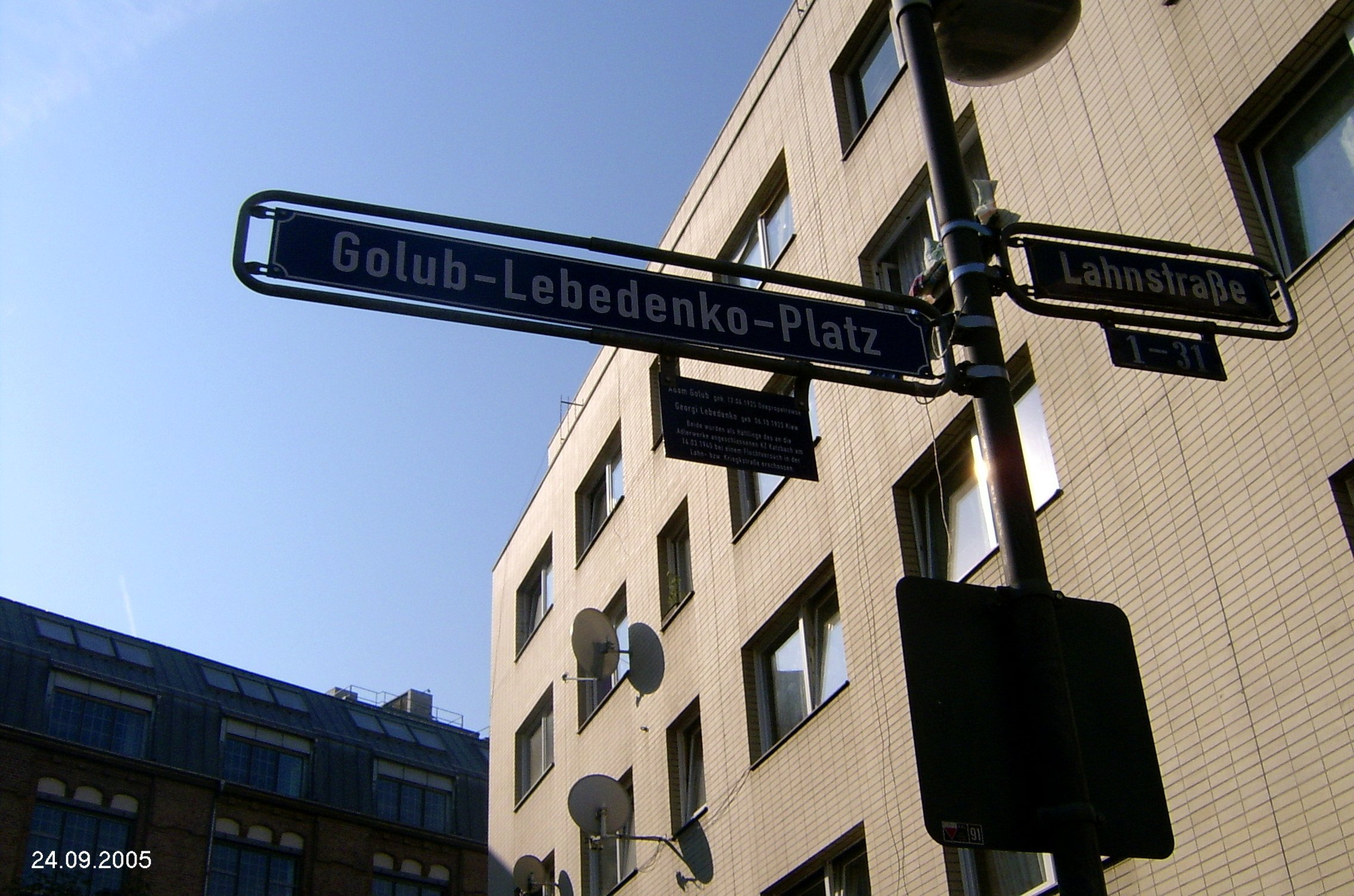 Straßenschild am Golub-Lebedenko-Platz in Frankfurt am Main (Gallusviertel), im Hintergrund die Adlerwerke in welchen während dem 2. Weltkrieg ein KZ untergebracht war